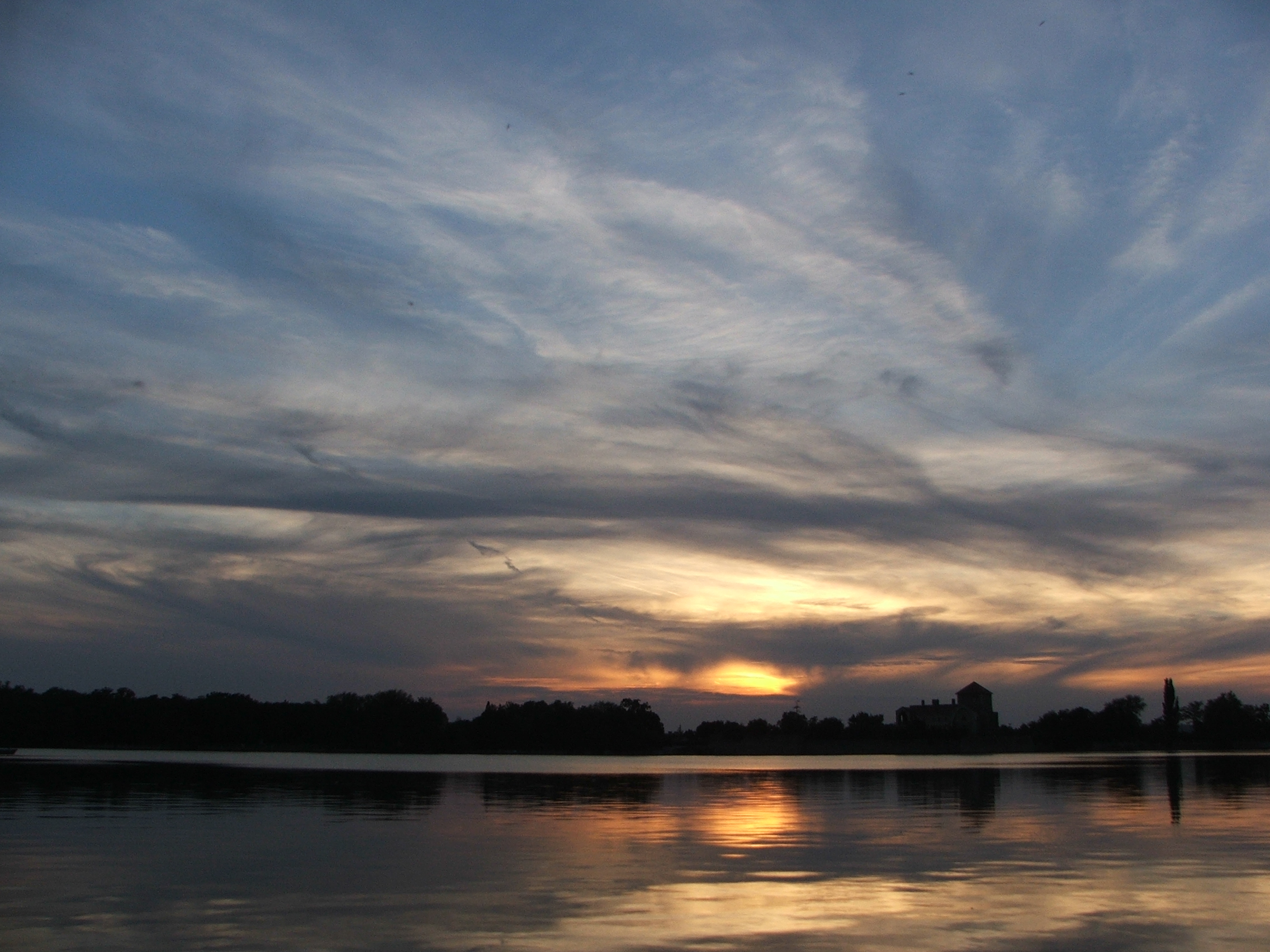 Sunset over Öreg-tó (Old Lake), Tata, Hungary Photo: József Süveg (2005)